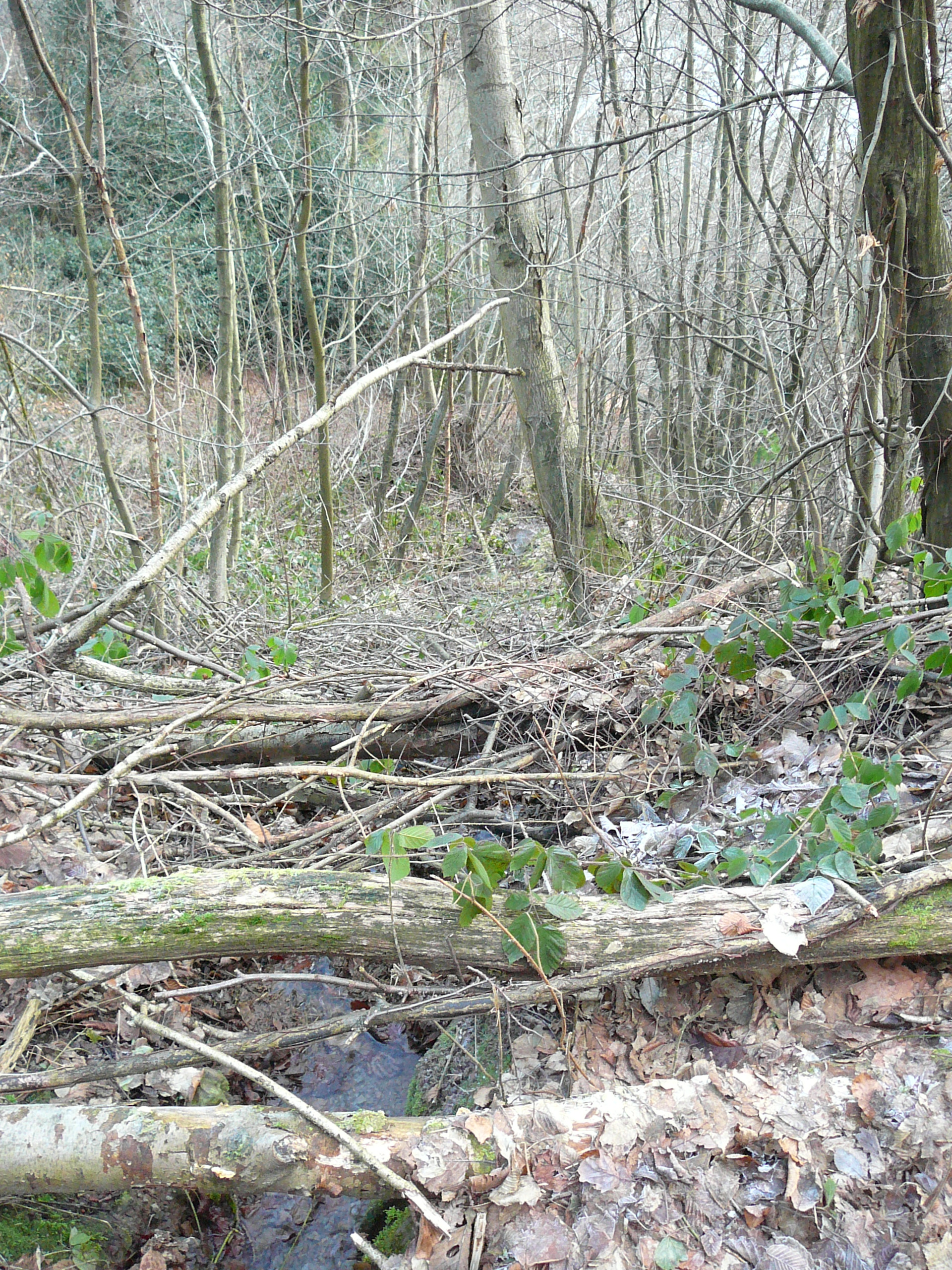 Boltenheide, Wuppertal